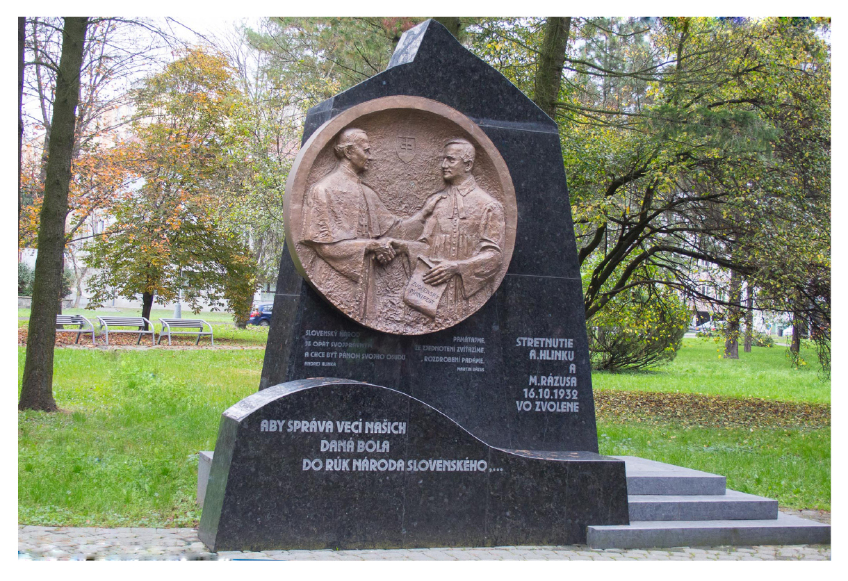 Pamätník zvolenského memoranda z roku 1932